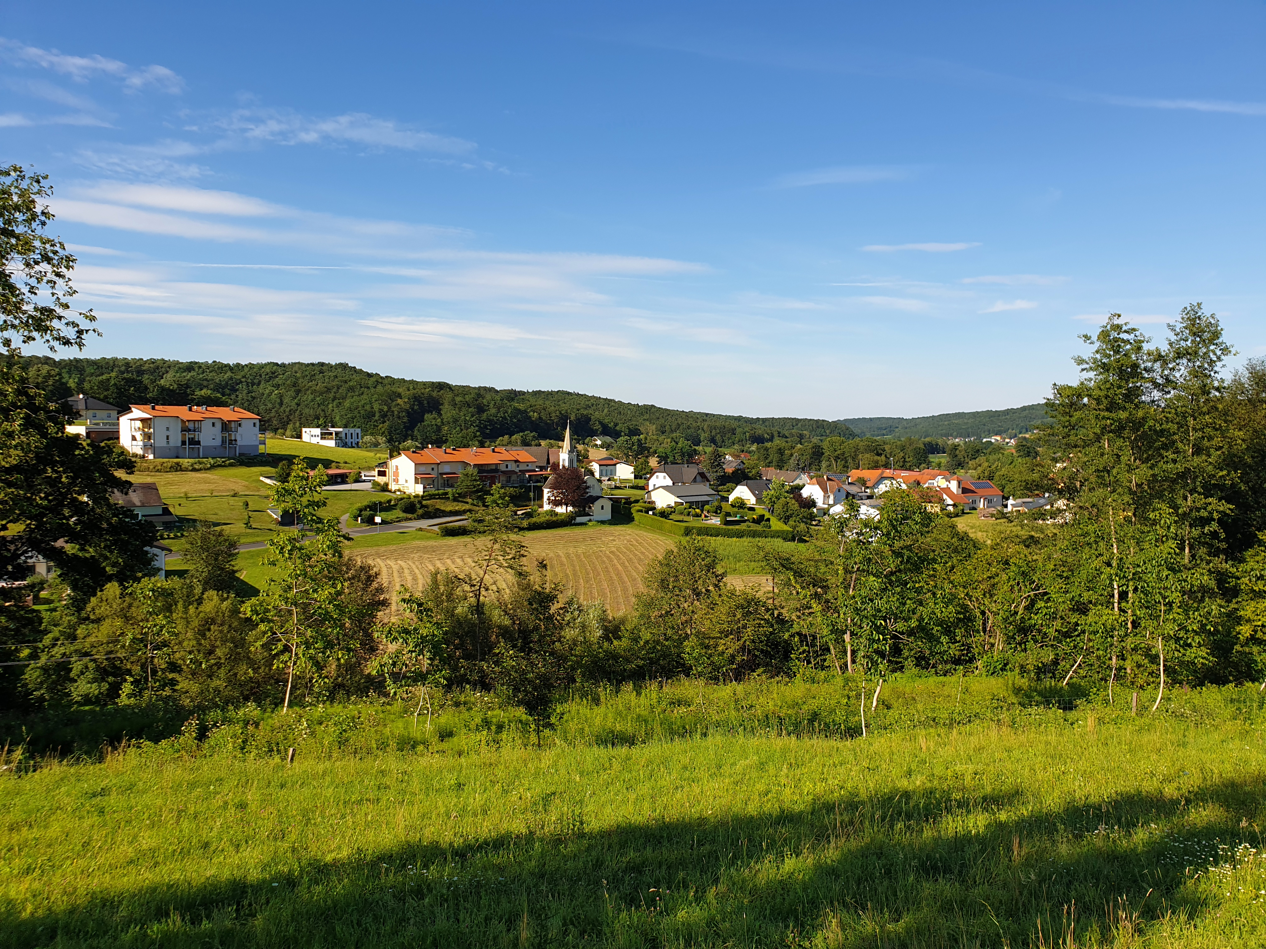 Ortsansicht von Minihof-Liebau von Südwesten.